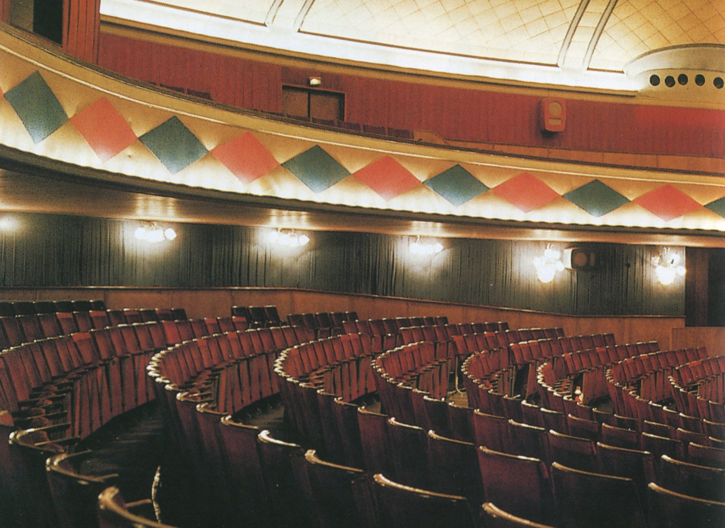 Salongen för Vinterpalatset i Stockholm